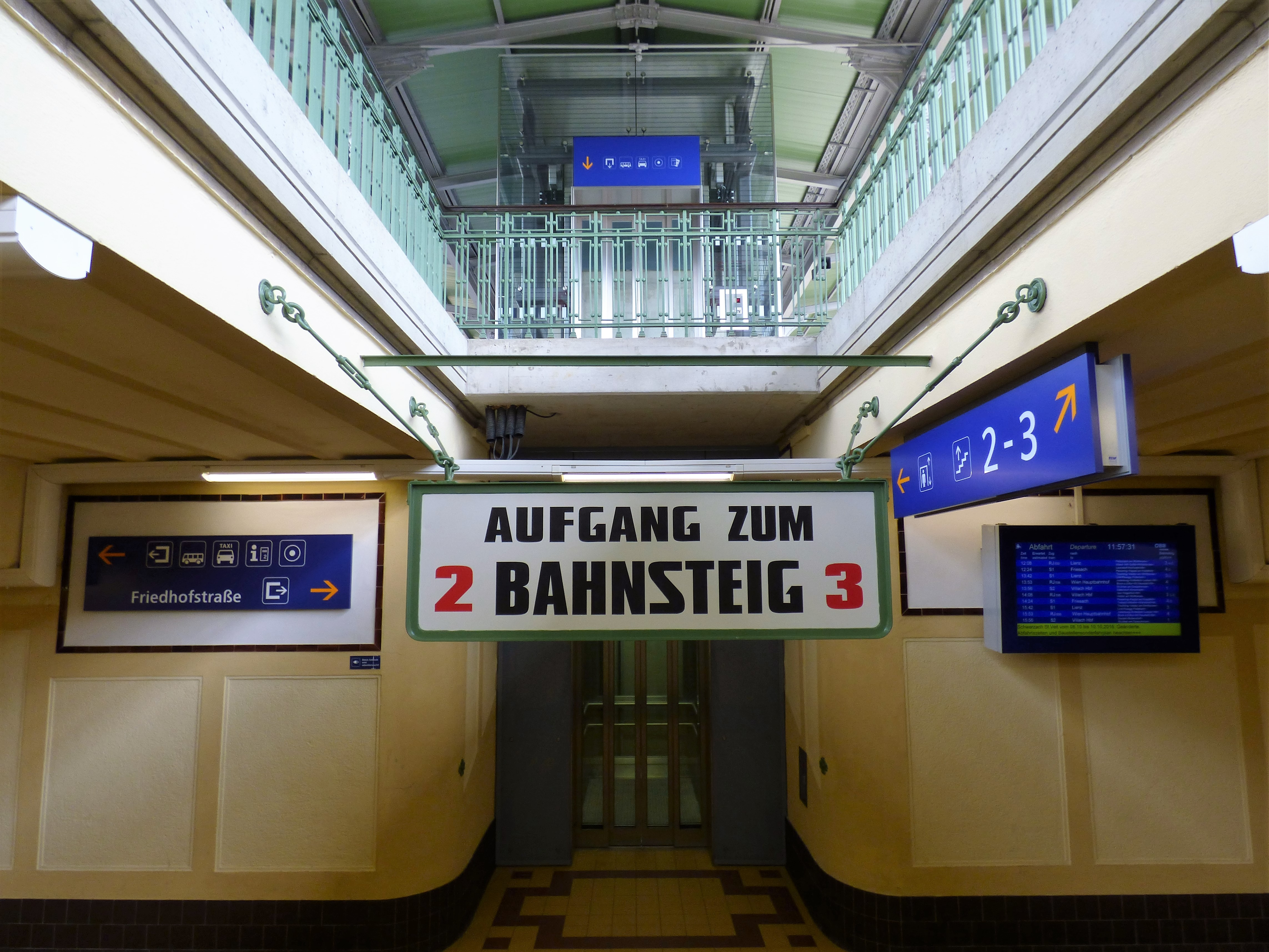 Bahnhof Sankt Veit an der Glan: Unterführung der Bahnsteige.